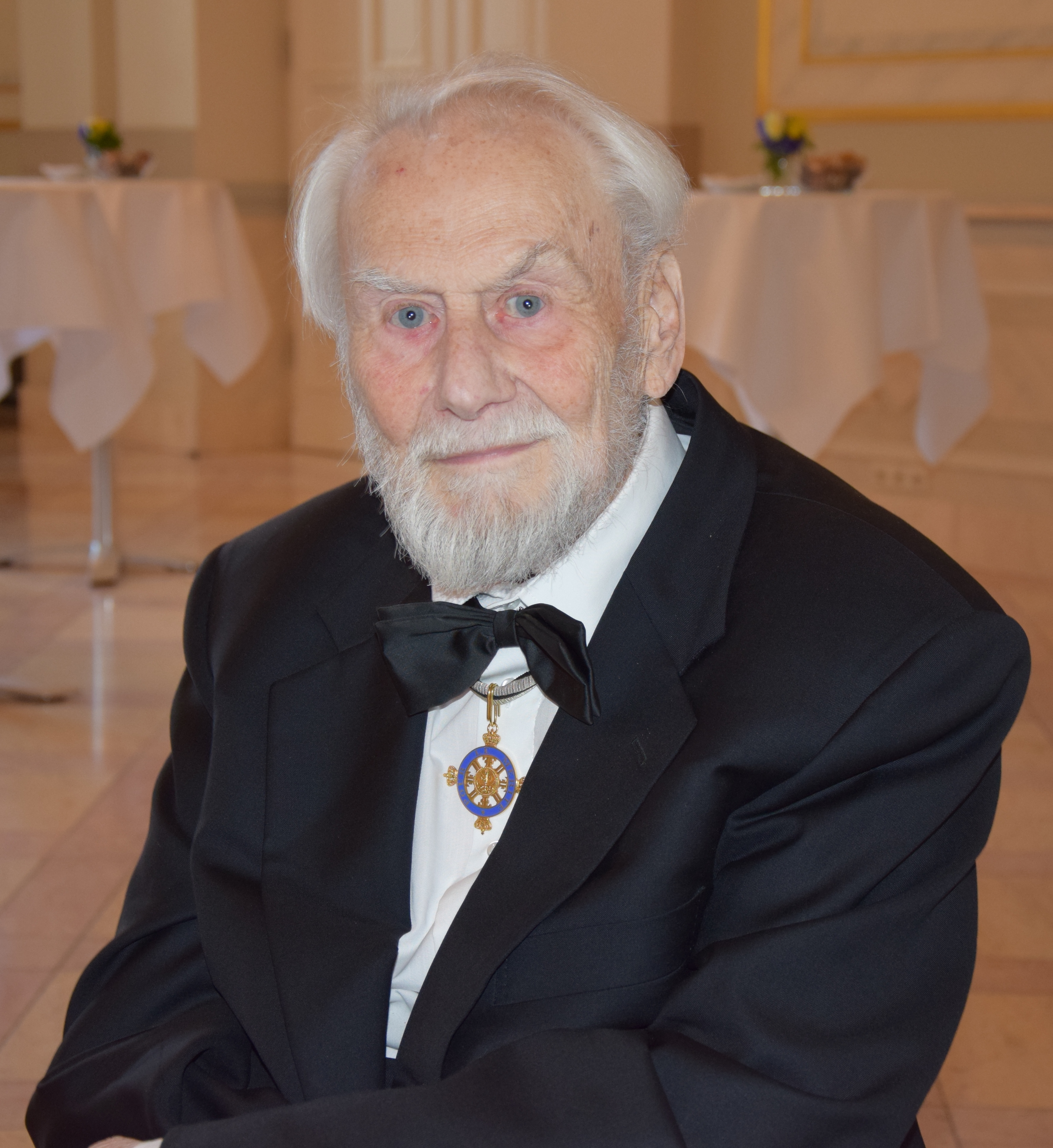 Öffentliche Sitzung der Mitglieder des Ordens Pour le mérite für Wissenschaften und Künste 2014 im Konzerthaus am Gendarmenmarkt in Berlin